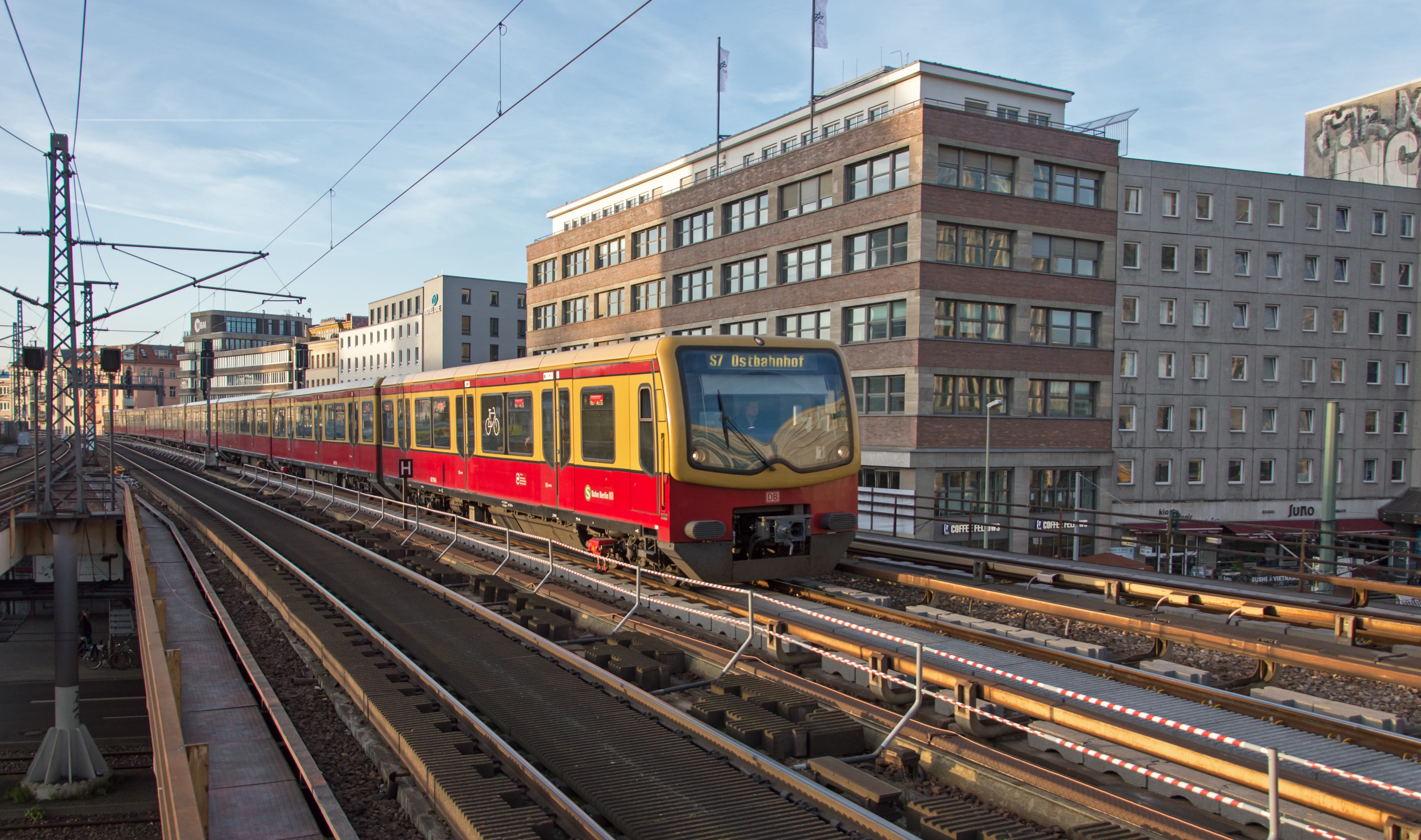 Berlin Alexanderplatz, de S-Bahn 7 uit Potsdam Hbf naar Berlin Ostbahnhof